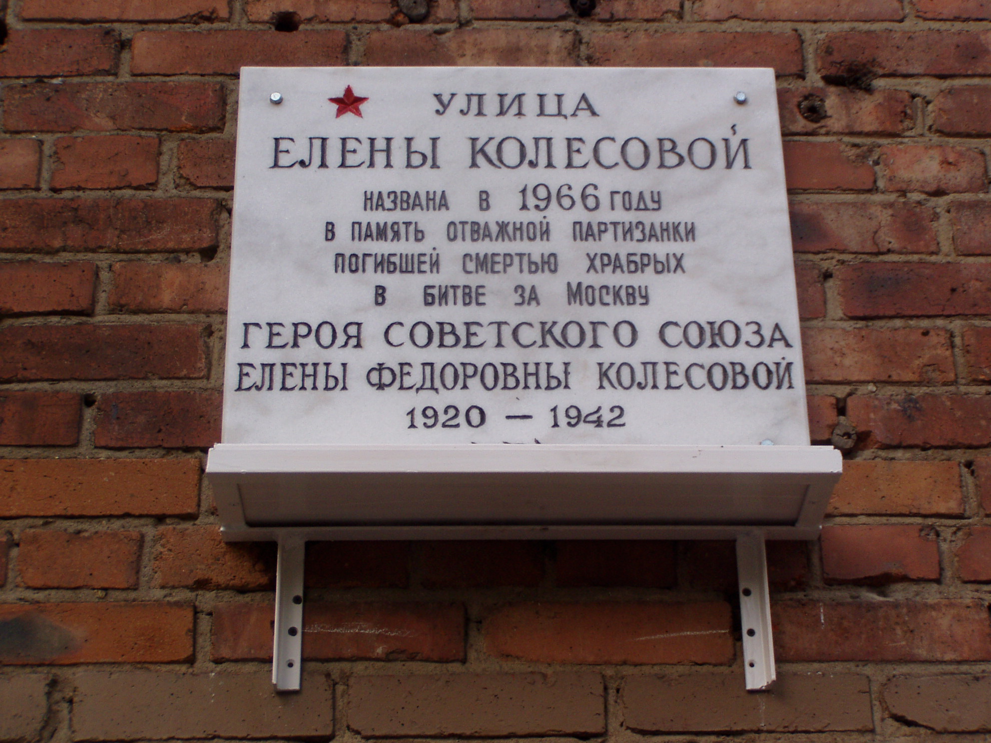 Мемориальная доска на улице Елены Колесовой в Москве.